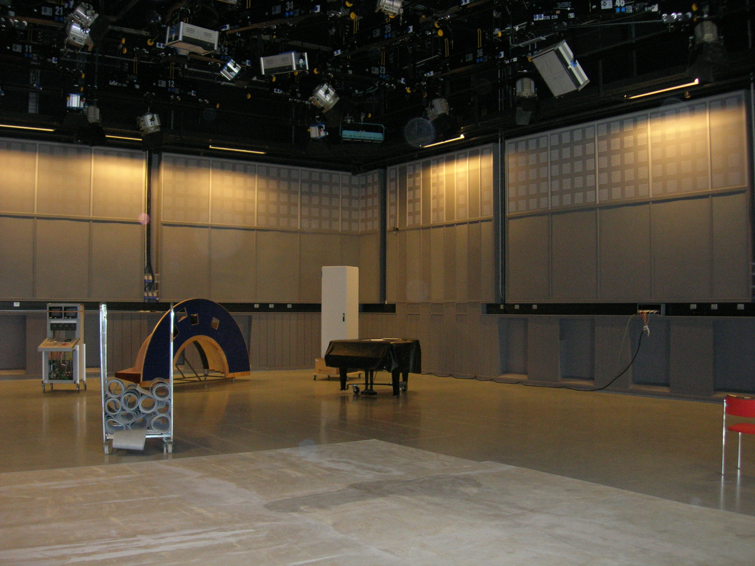 Dramatiska institutet